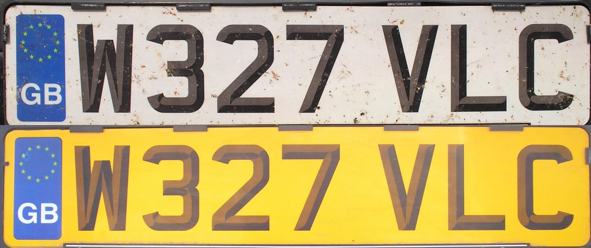 Номерний знак